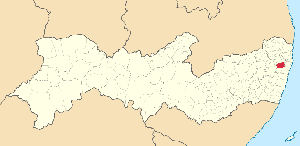 Mapa de São Lourenço da Mata (2)